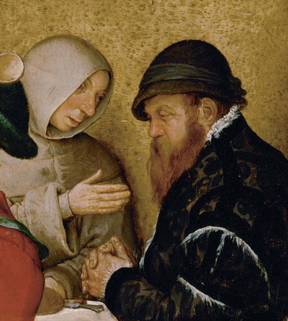 Detail aus Pieter Bruegels Gemälde Die Bauernhochzeit: Ein Mönch im Gespräch mit einem Gutsherren